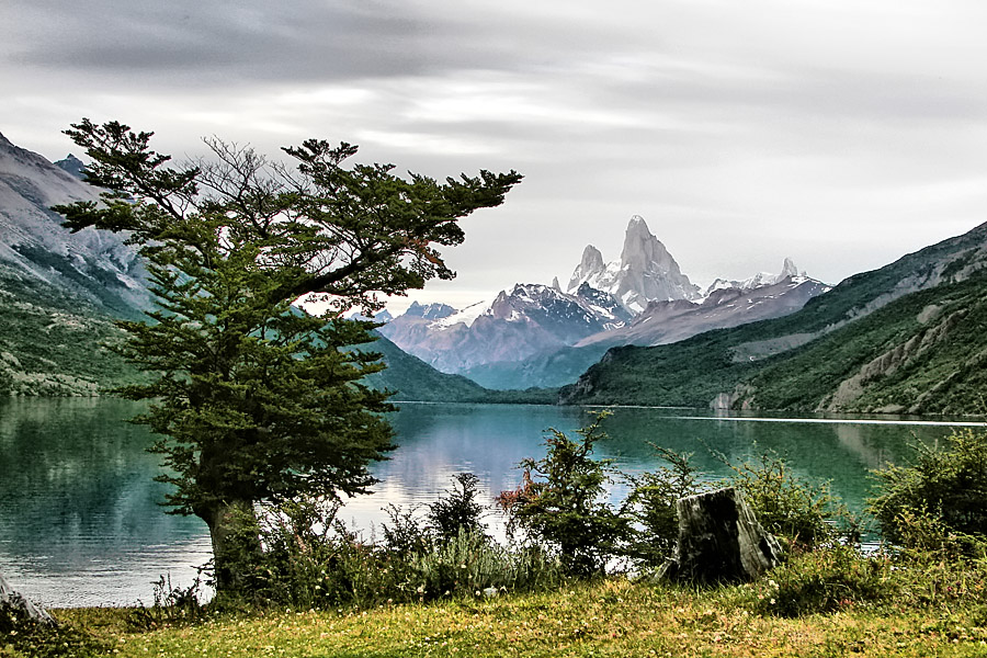 Vista del Lago del Desierto, Argentina. Al fondo a la derecha puede observarse el monte Fitz Roy (o cerro Chaltén).